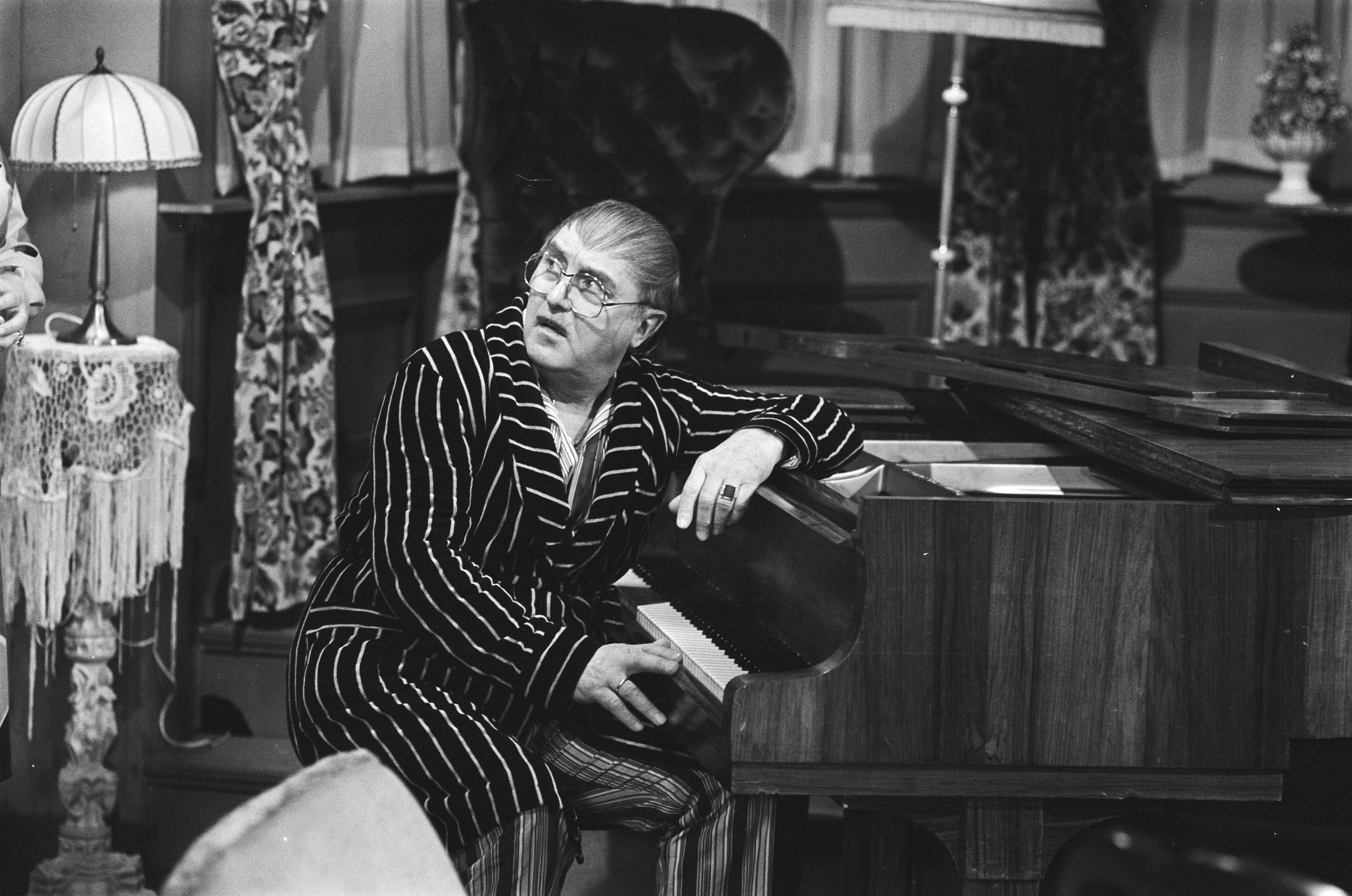 Collectie / Archief : Fotocollectie Anefo Reportage / Serie : [ onbekend ] Beschrijving : VPRO-televisie opnamen serie "Waldolala' met Dolf Brouwers (bekend als Sjef van Oekel) als Waldo van Dungen Datum : 1 februari 1978 Trefwoorden : televisie, televisieprogramma's Persoonsnaam : Brouwers, Dolf Fotograaf : Bogaerts, Rob / Anefo Auteursrechthebbende : Nationaal Archief Materiaalsoort : Negatief (zwart/wit) Nummer archiefinventaris : bekijk toegang 2.24.01.05 Bestanddeelnummer : 929-5531